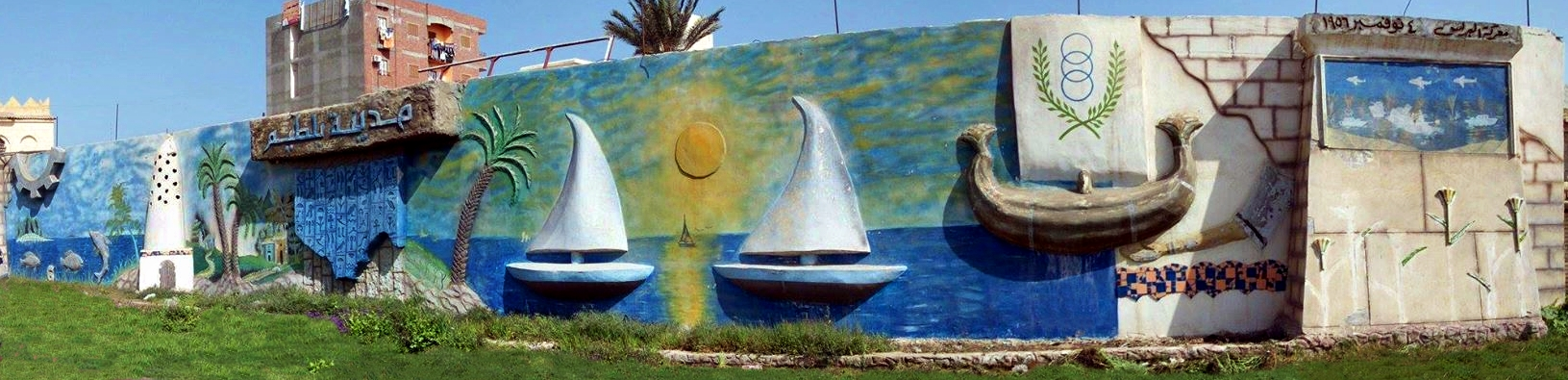 مدينة بلطيم، مركز البرلس، مصر.